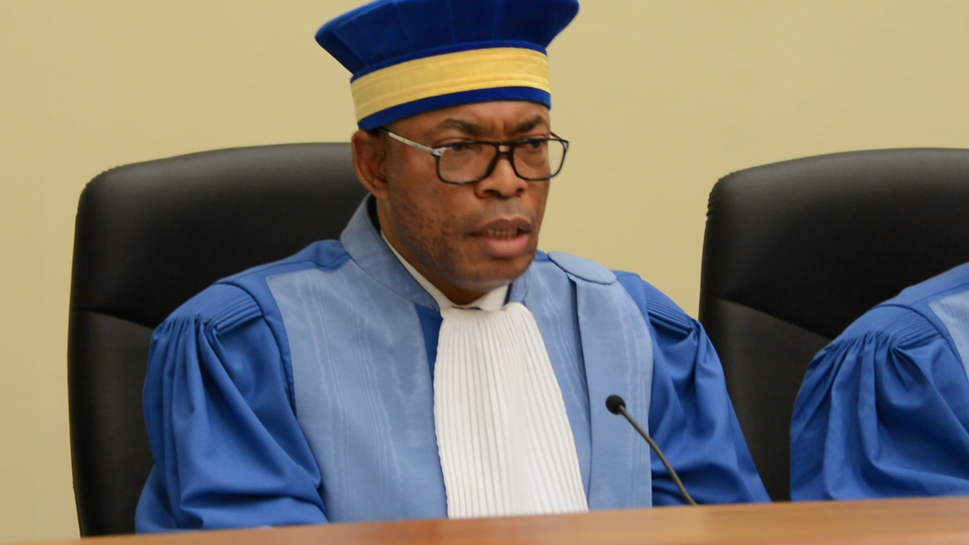 Juge à la Cour Constitutionnelle de la R.D.CONGO